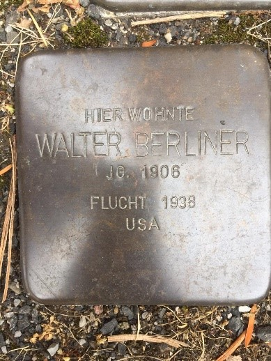 Stolpersteine